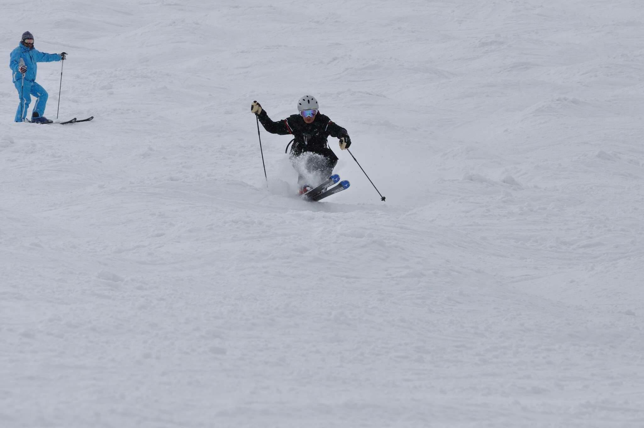 アルペンスキー技術 コブの吸収動作